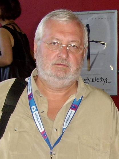 Janusz Zaorski - polski reżyser filmowy